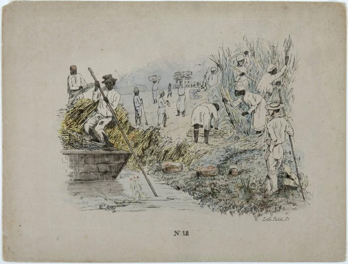 Litho. Ingekleurde litho door Petit naar een tekening van Théodore Bray (no. 12/25). Voorstelling van het oogsten van suikerriet op een slavenplantage. Rechts een 'blankofficier', de Europese opzichter. Links op de voorgrond een zogenoemde pondo, een vaartuig met platte bodem waarmee het riet naar de plantage werd vervoerd.. Ingekleurde litho voorstellende de oogst op een suikerrietplantage